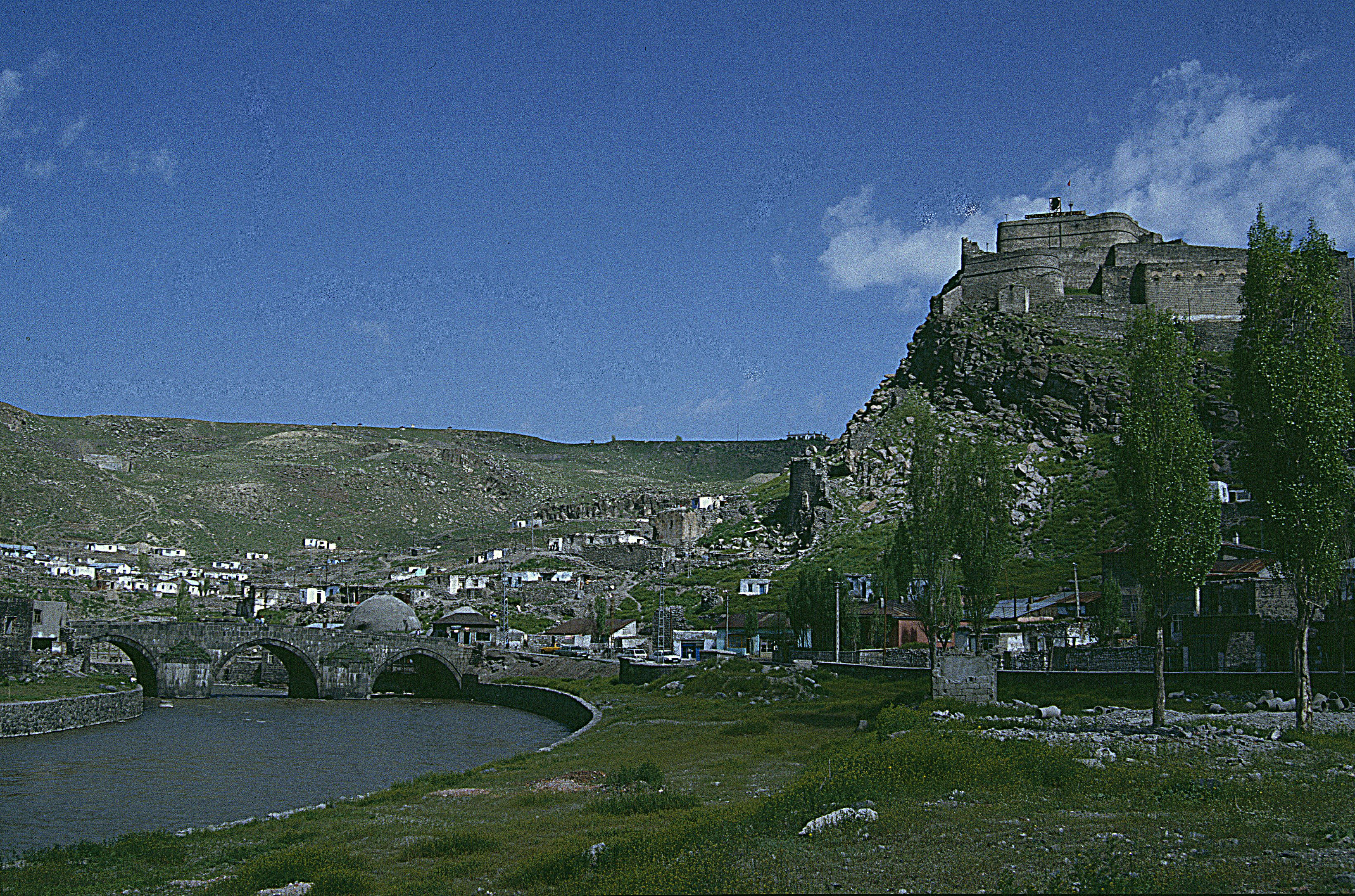 Zitadelle in Kars